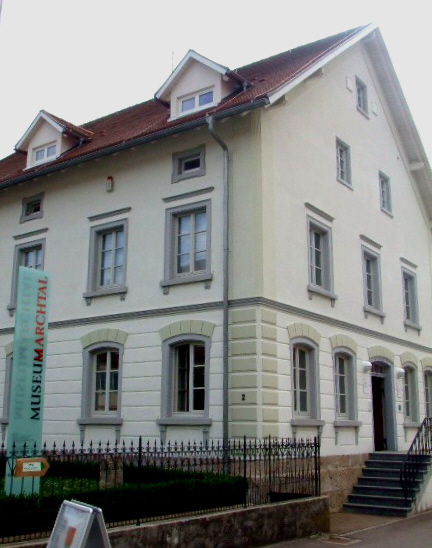 Obermarchtal, Alb-Donau-Kreis Heimatmuseum (früher Wohnhaus einer Bauernfamilie)